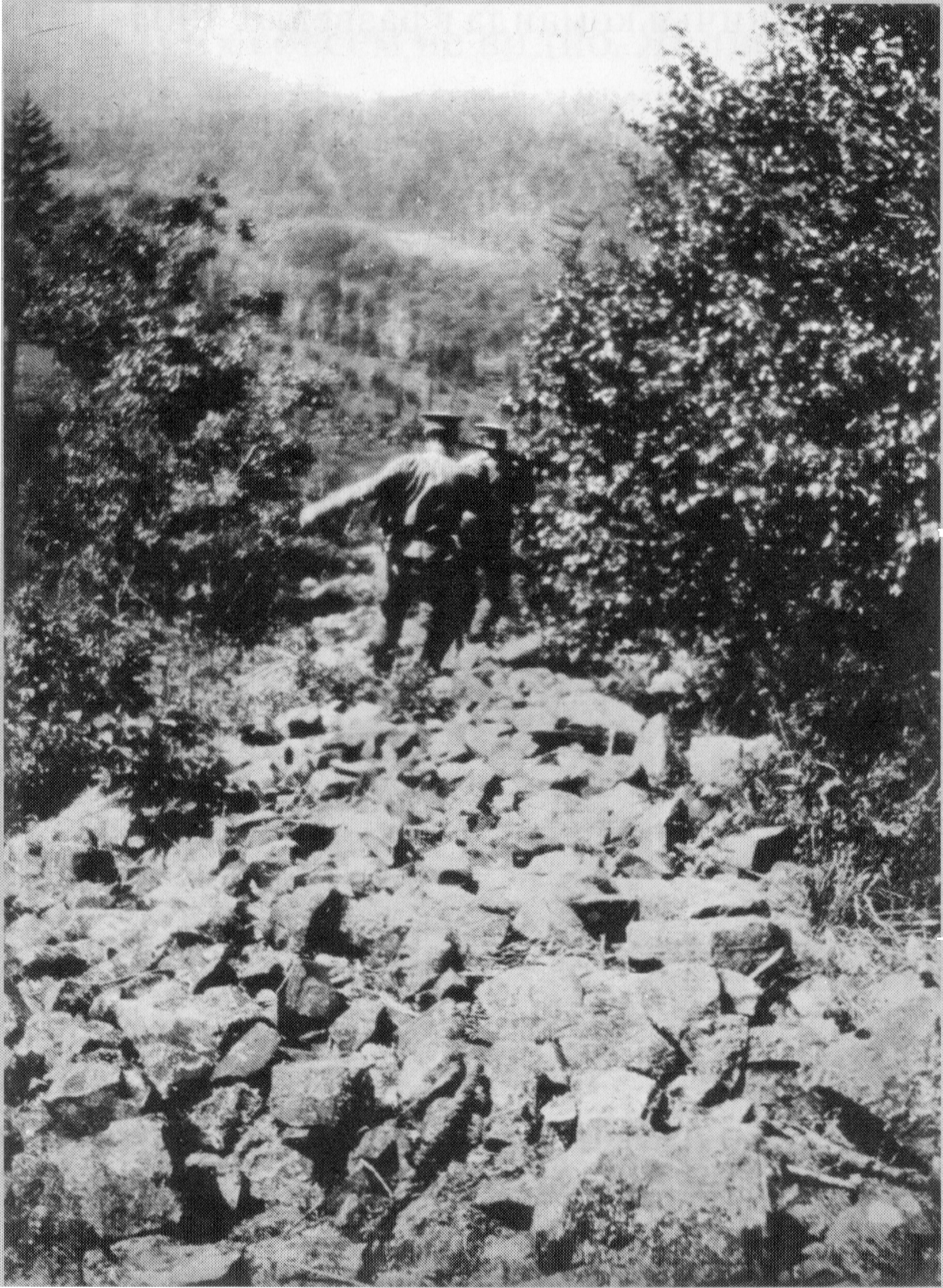 Спуск по осыпи. Фотоснимок Владимира Клавдиевича Арсеньева, напечатанный со стеклянного диапозитива, которым Арсеньев пользовался при чтении лекций